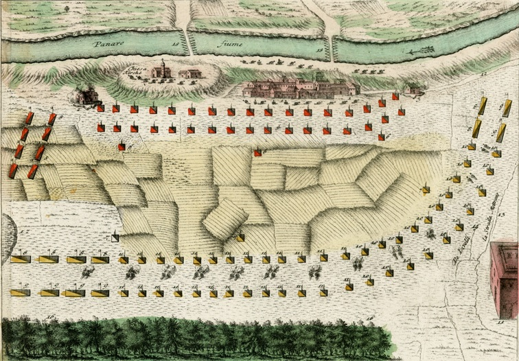 Action beym Panaro fluss an Campo Santo 1743